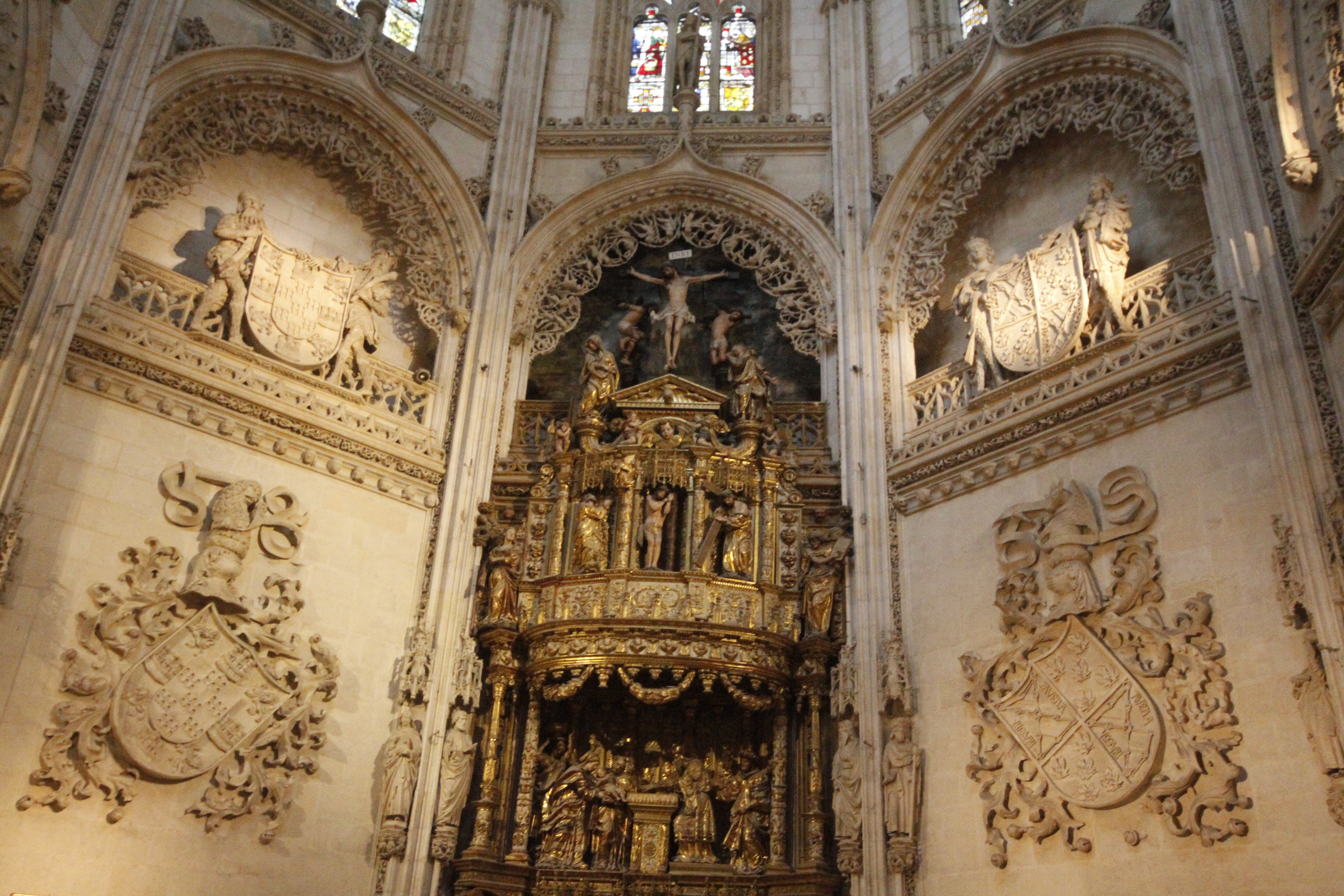 Interior da Catedral